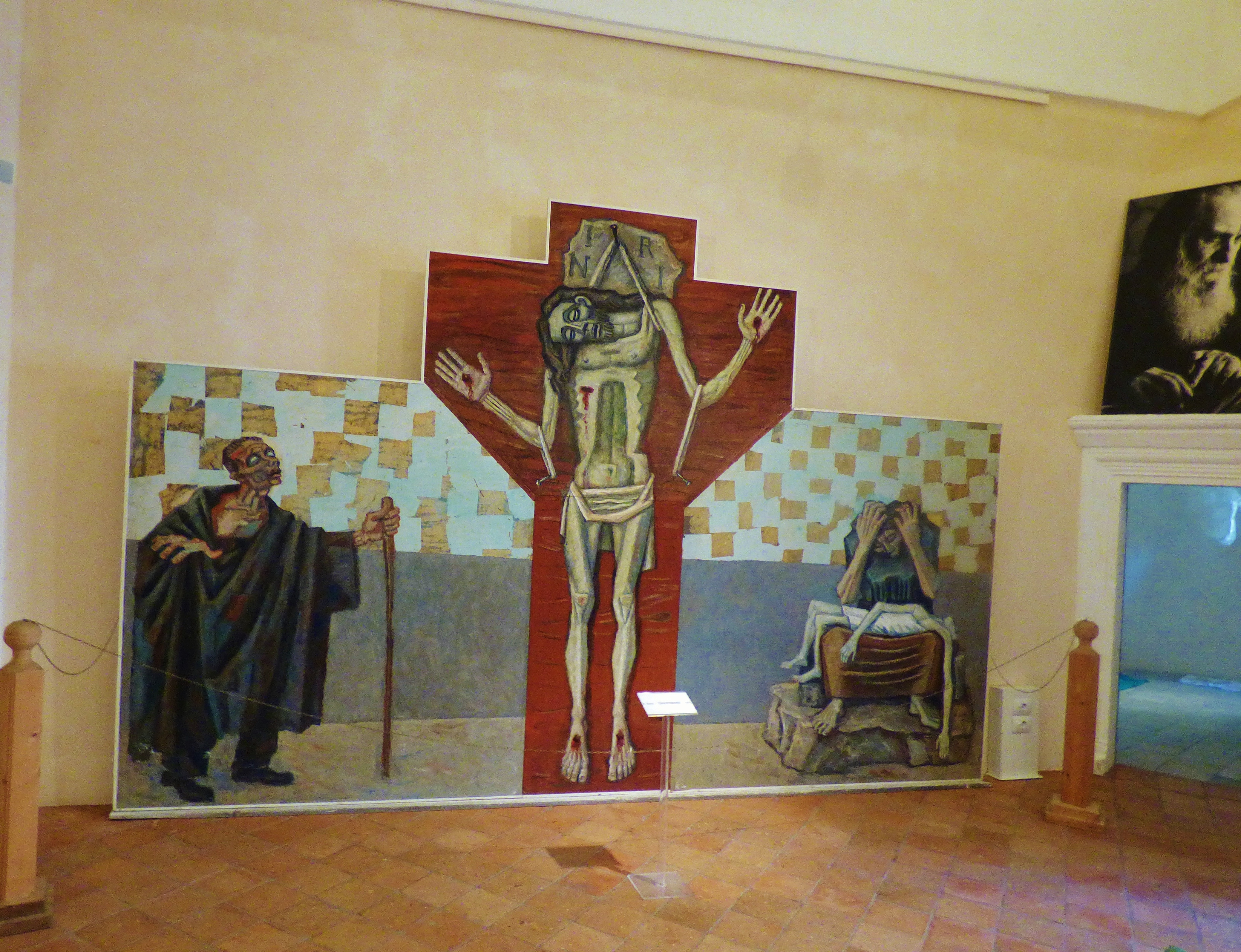 La Crocifissione n° 2 dell'artista Emilio Notte esposta presso il Castello Ducale di Ceglie Messapica nella pinacoteca comunale dedicata all'artista.